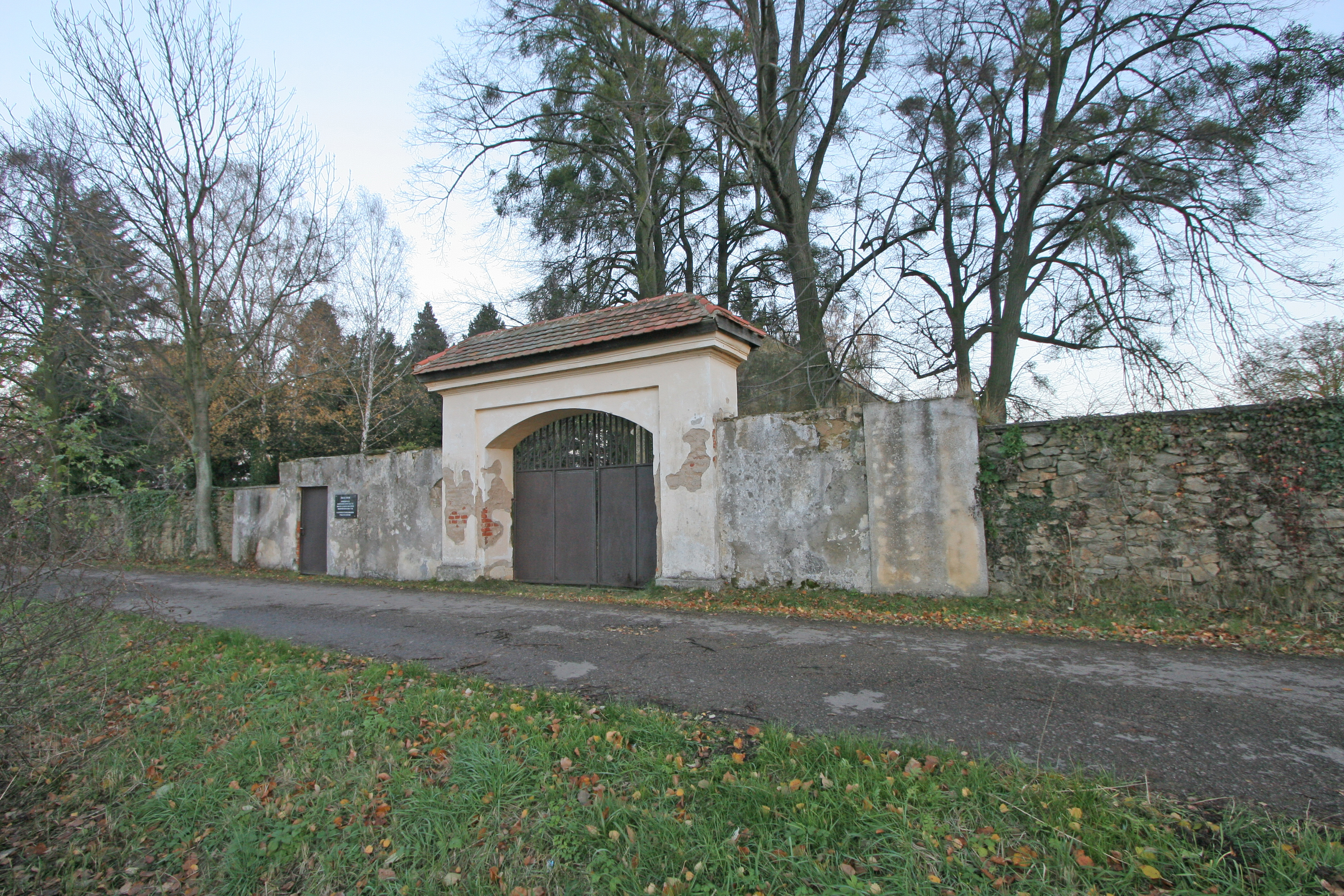 Židovský hřbitov (Golčův Jeníkov), Z od města, Golčův Jeníkov